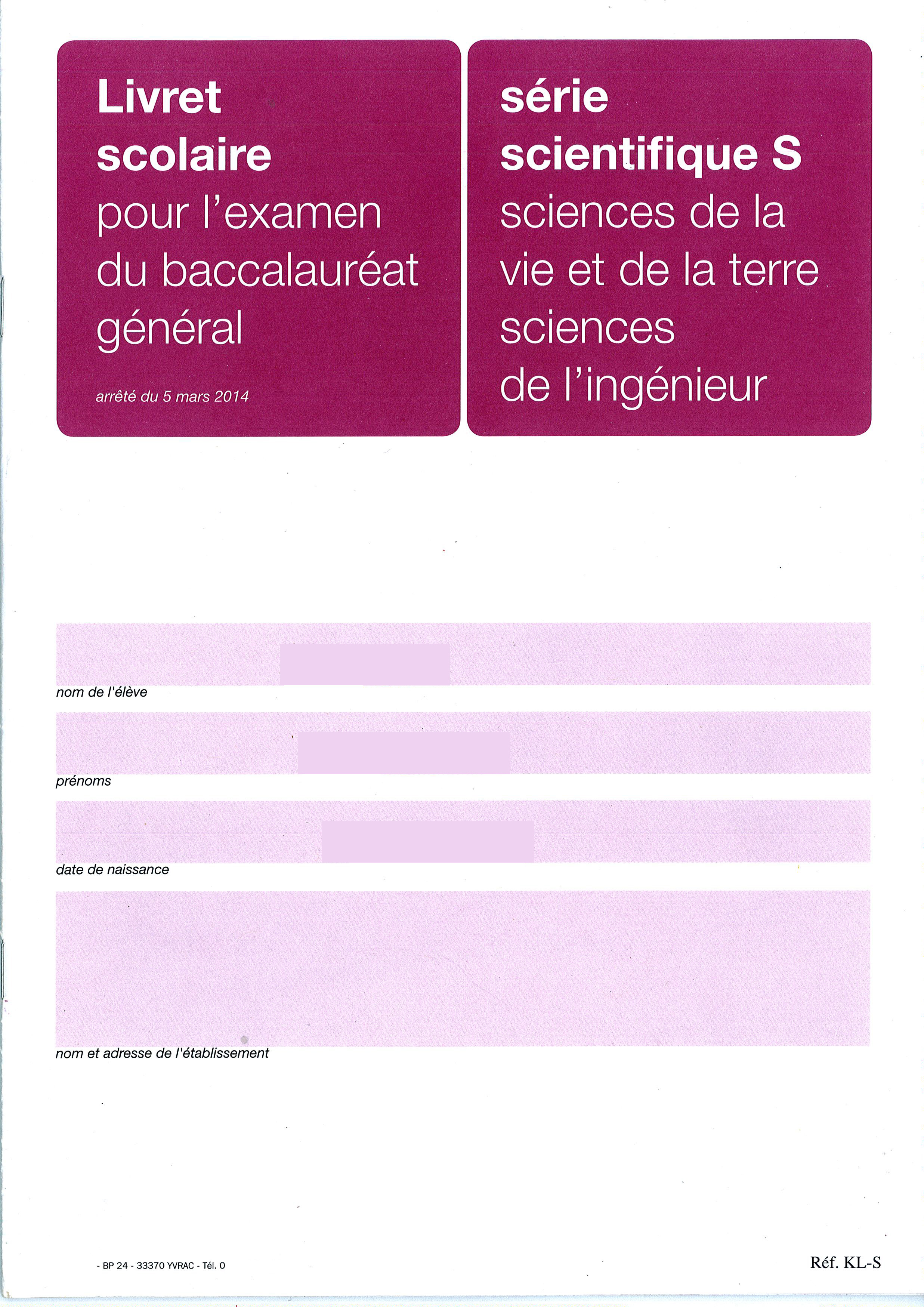 Première de couverture du livret scolaire papier dans le secondaire expurgé des logos sous droits d'auteurs et des données personnelles.